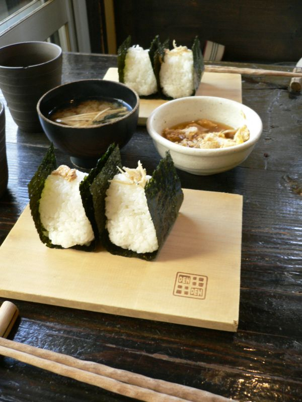 おにぎり（東京都渋谷区猿楽町23、代官山駅最寄り、おにぎり専門店「おにぎり田田 でんでん」）